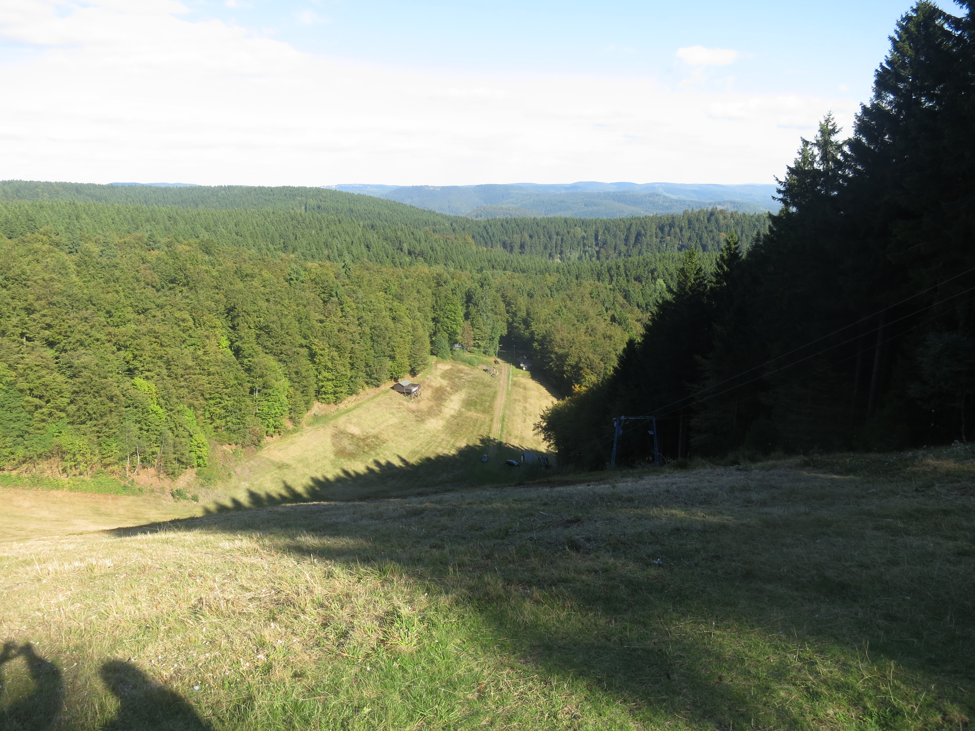 Skipiste mit Doppelschlepplift auf dem Ravensberg